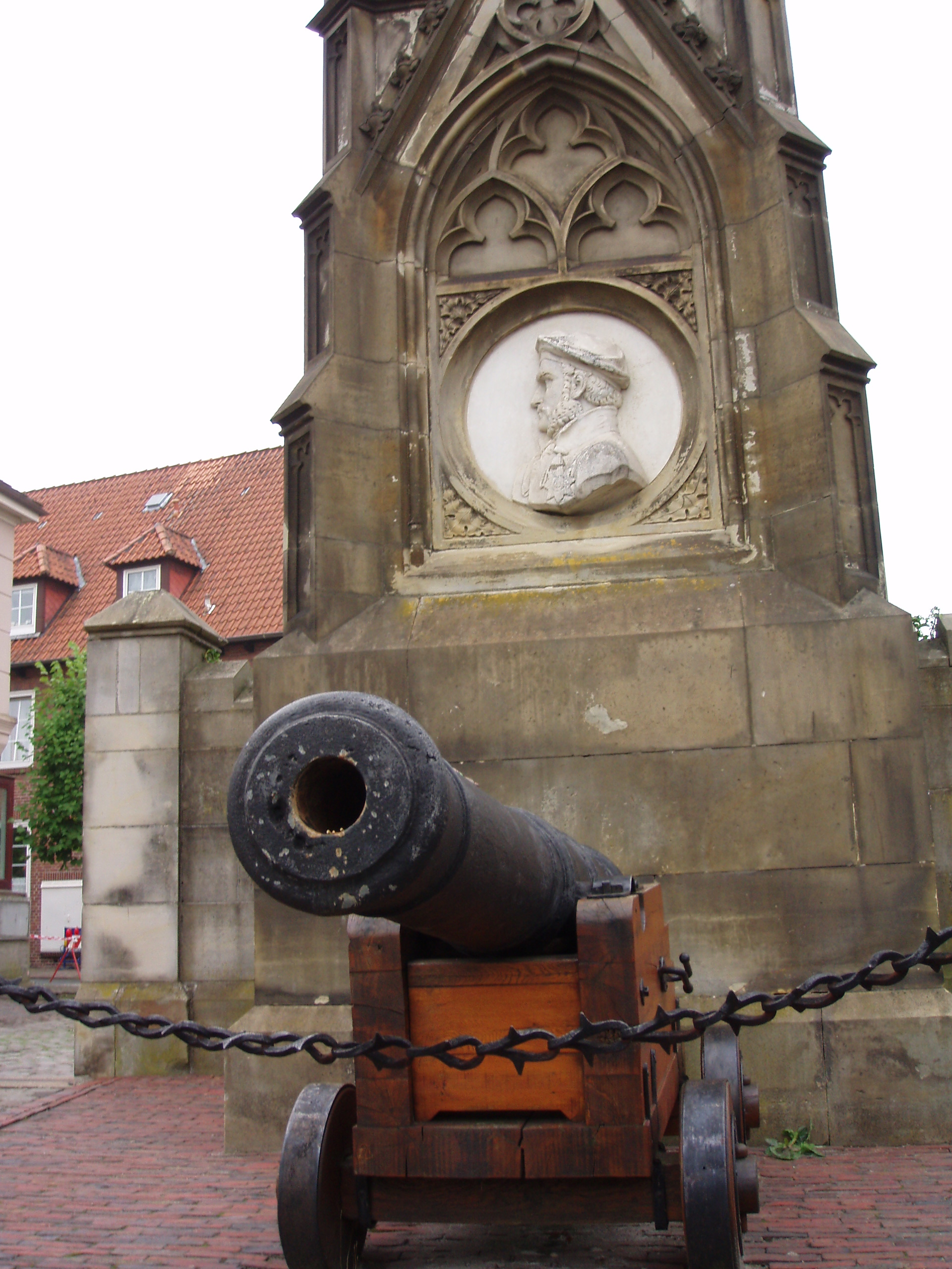 Denkmal am Hafen von Elsfleth, Detail